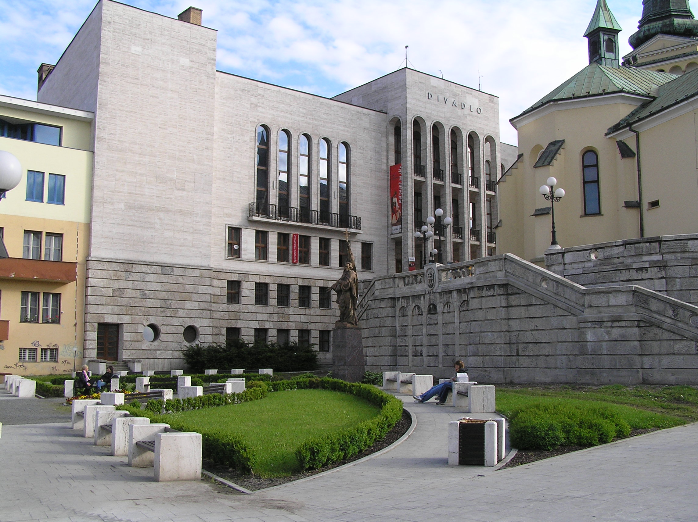 Žilina, Námestie A. Hlinku: pohľad na divadlo